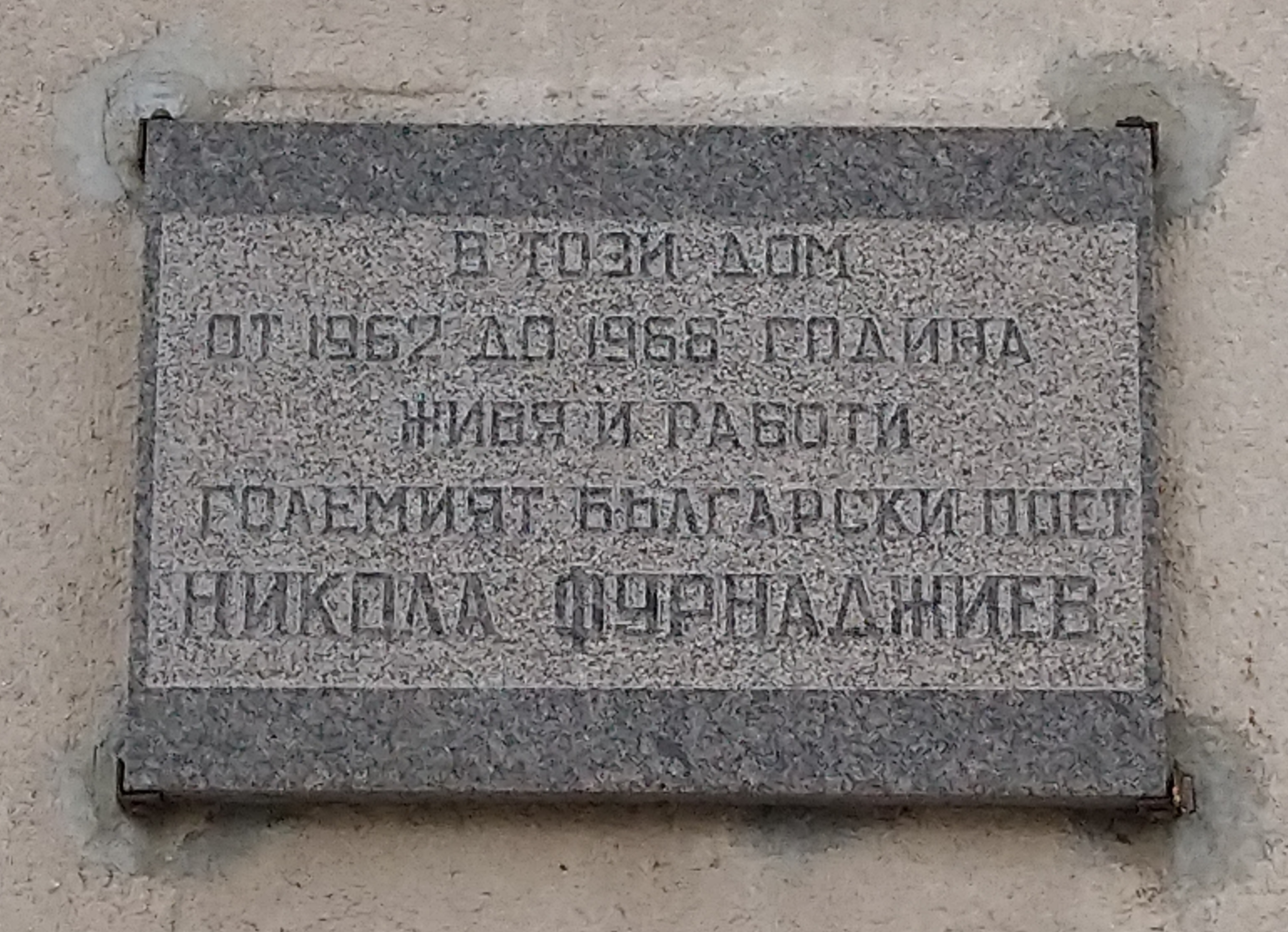 Паметна плоча на Никола Фурнаджиев. София кв. „Долен Лозенец“ пл. „Папа Йоан Павел II“ № 3 вх. а